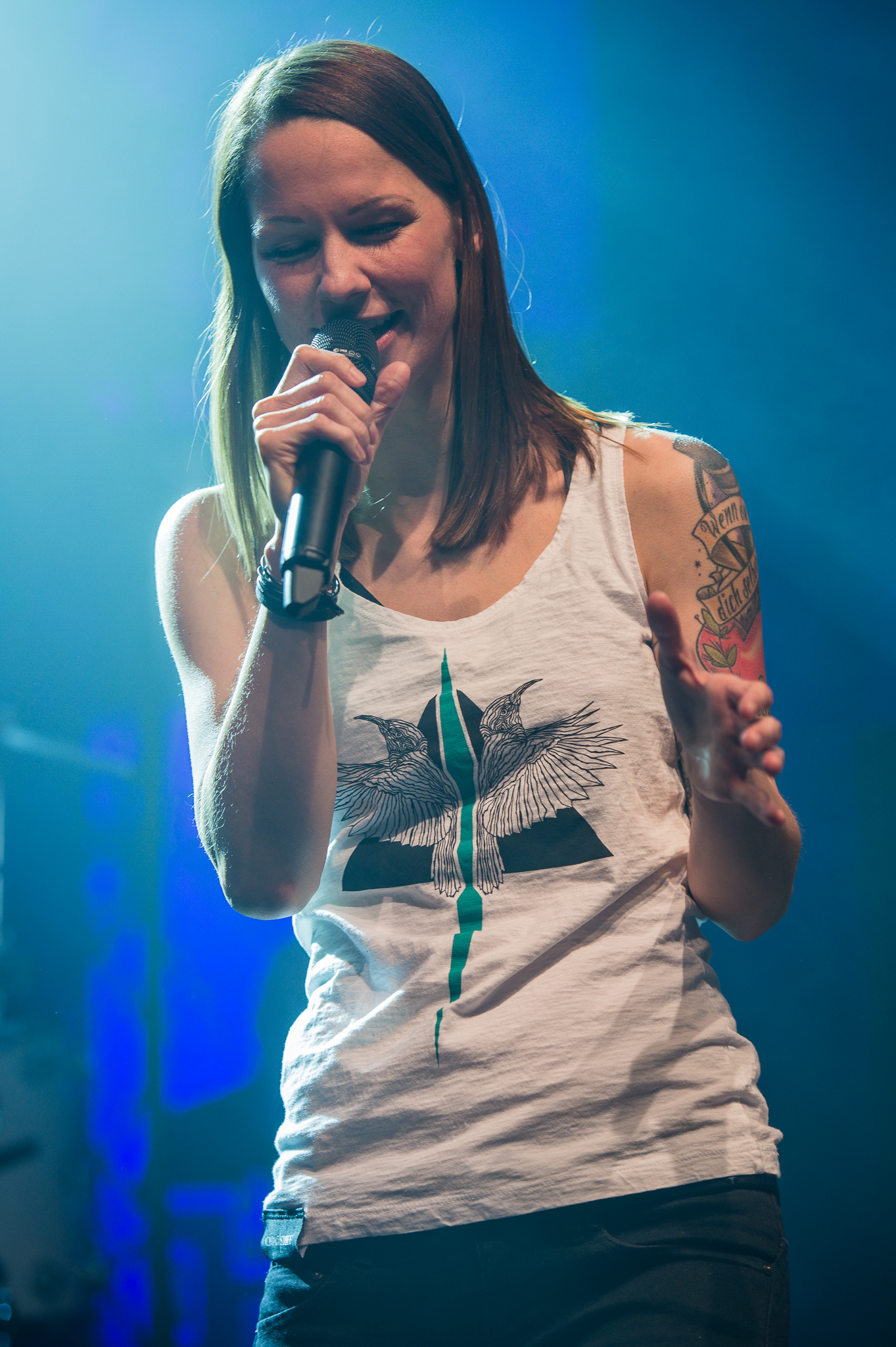 Christina Stürmer,Concertbüro Franken,Konzert,Livekonzert,Livemusik,Löwensaal,Musik